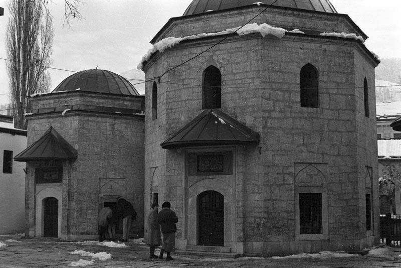 Тюрбето на Хюсрев бей в двора на неговата джаия в Сараево.